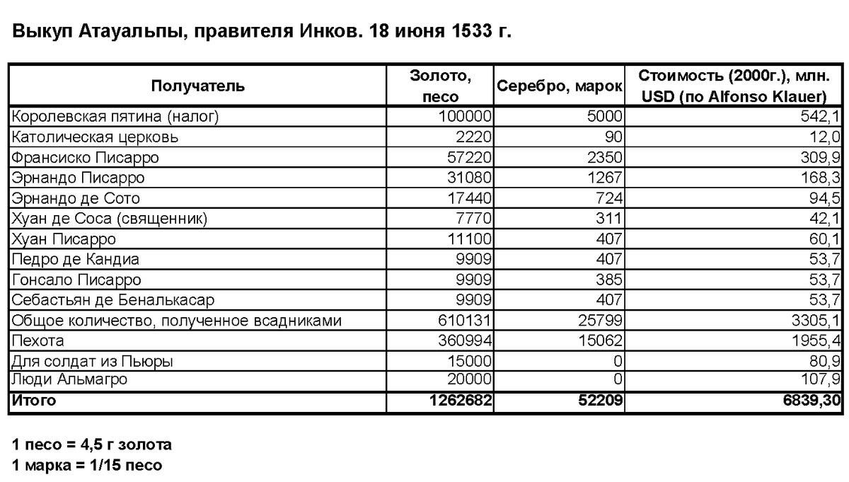 Выкуп Атавальпы. 18-06-1533г.